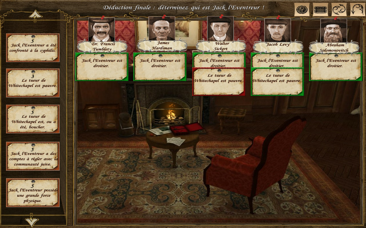 Capture d'écran du jeu Sherlock Holmes contre Jack l'Éventreur. Il s'agit ici du tableau récapitulatif de la fin du jeu, permettant au joueur de déterminer qui est le tueur de Whitechapel. Le joueur doit placer pour chaque suspect les étiquettes qui lui correspondent. Lorsqu'une étiquette est associée à la bonne personne, elle devient verte. Dans le cas contraire, elle devient rouge.